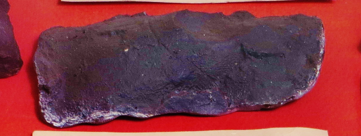 Fossil of Deltasaurus, an extinct amphibian- Took the photo at Musee d'Histoire Naturelle, Paris